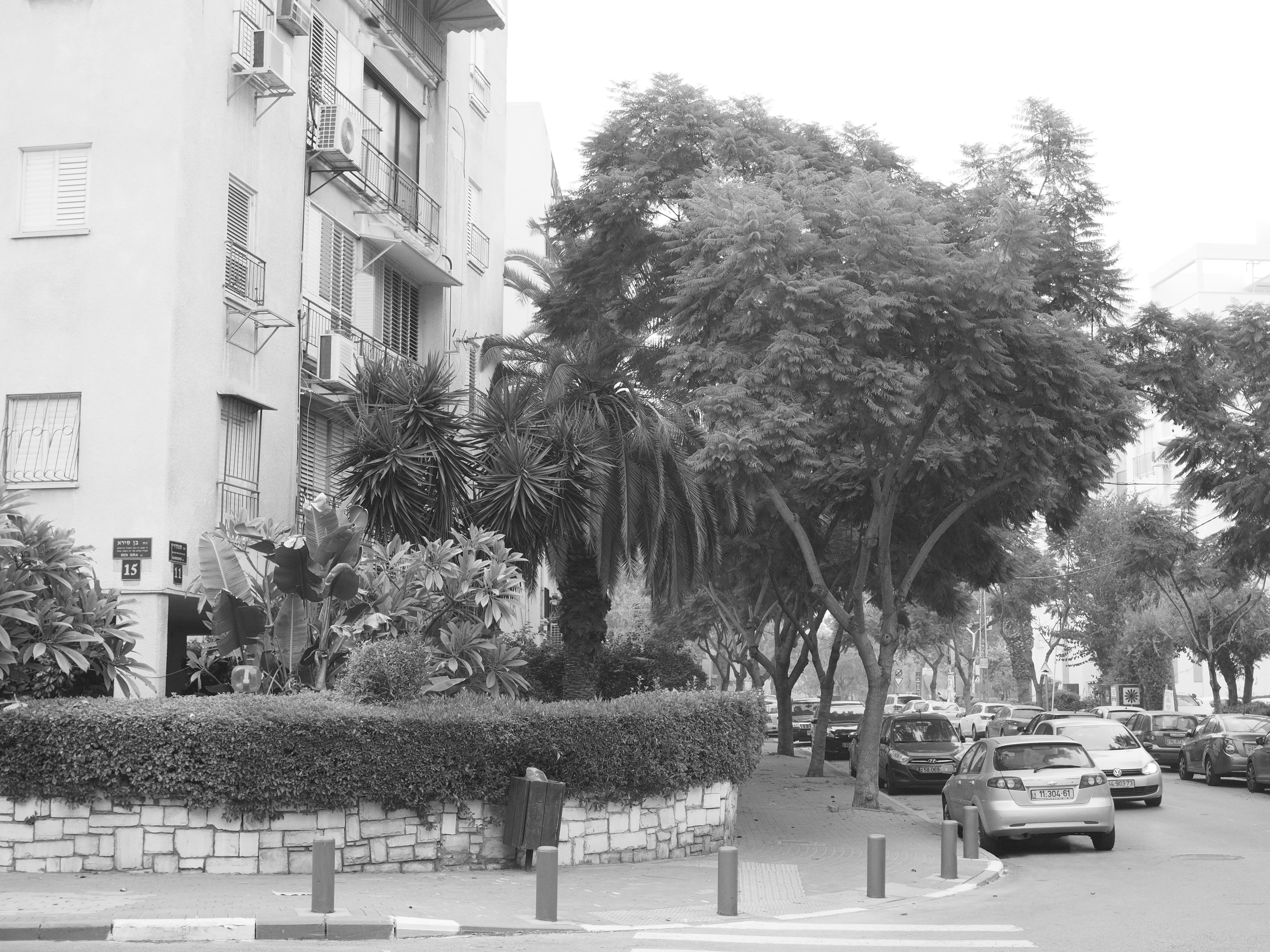 OM-D E-M10 Mark II. Tel Aviv-Yafo